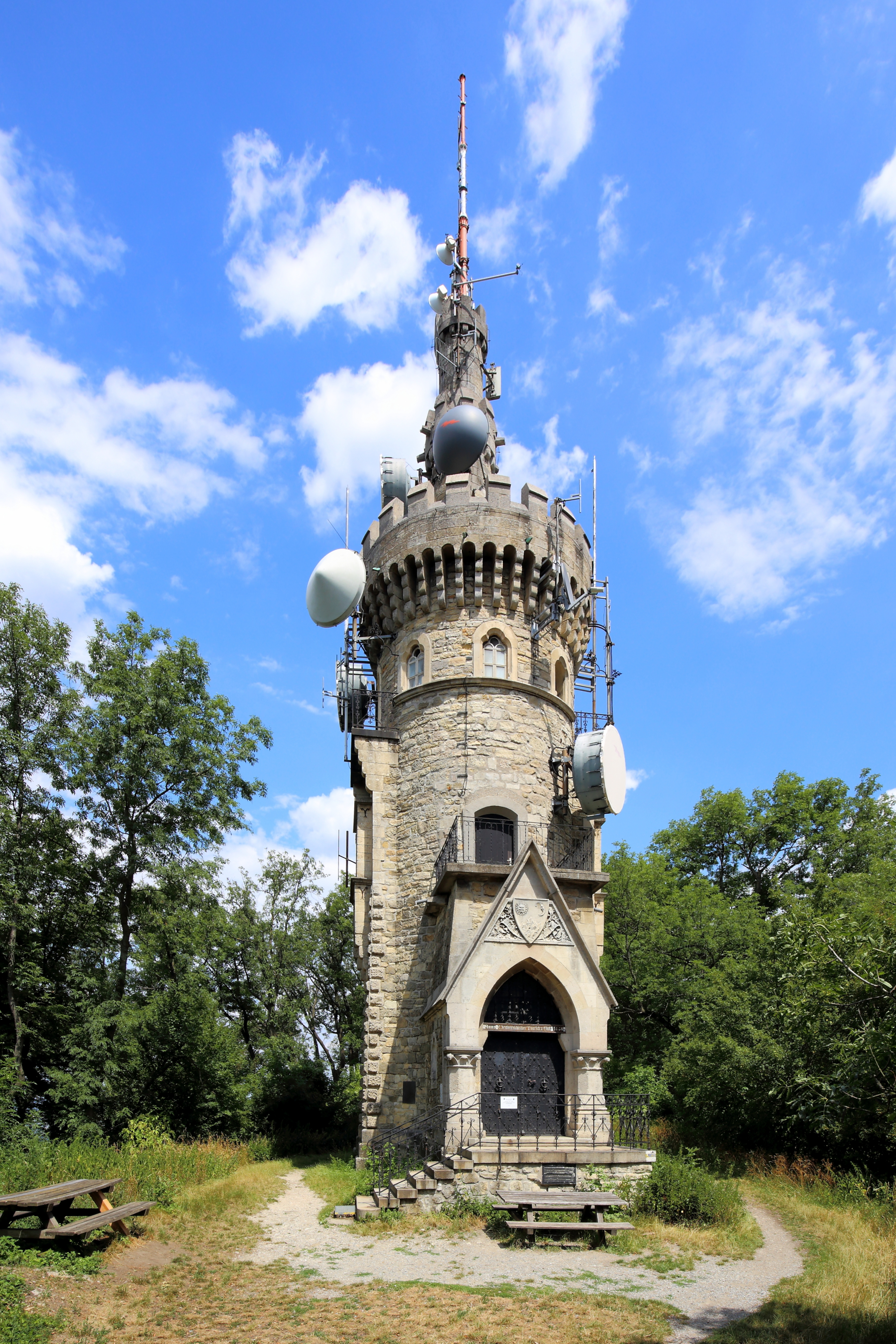 Westansicht der Habsburgwarte im 19. Wiener Gemeindebezirk Döbling.Die Aussichtswarte wurde anlässlich des 40-jährigen Regierungsjubiläums von Kaiser Franz Joseph I. 1888 vom Österreichischen Touristenklub auf Wiens höchstem Berg, dem 542 Meter hohen Hermannskogel, errichtet. Im Zuge der österreichischen Landesvermessung 1892 wurde vom k. u. k. Militärgeographischen Institut auf der Warte ein Pfeiler errichtet, auf dem sich der Fundamental- bzw. Triangulierungshauptpunkt des österreichischen Festpunktfeldes befindet.